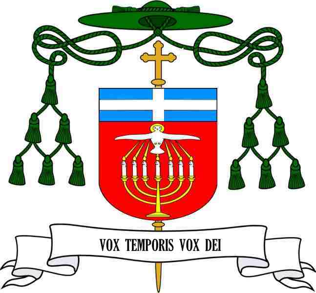 Wappen Michael Faulhaber, Bischof von Speyer (1911-1917)